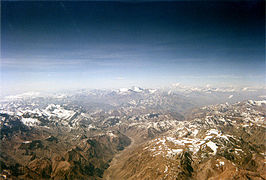 جبال الانديز من الاعلى